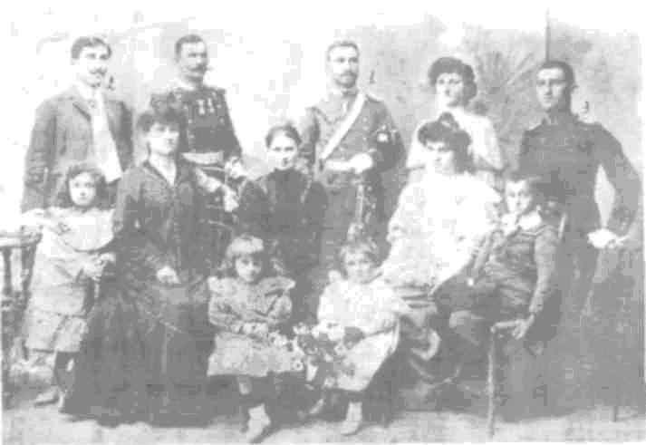 Димитър Думбалаков (1), Михаил Думбалаков (2) и Трендафил Думбалаков (3) със семейството им.